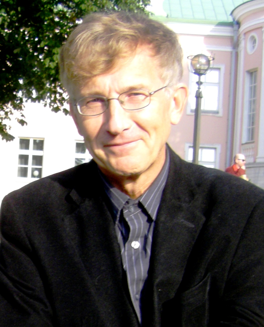 Ignar Fjuk